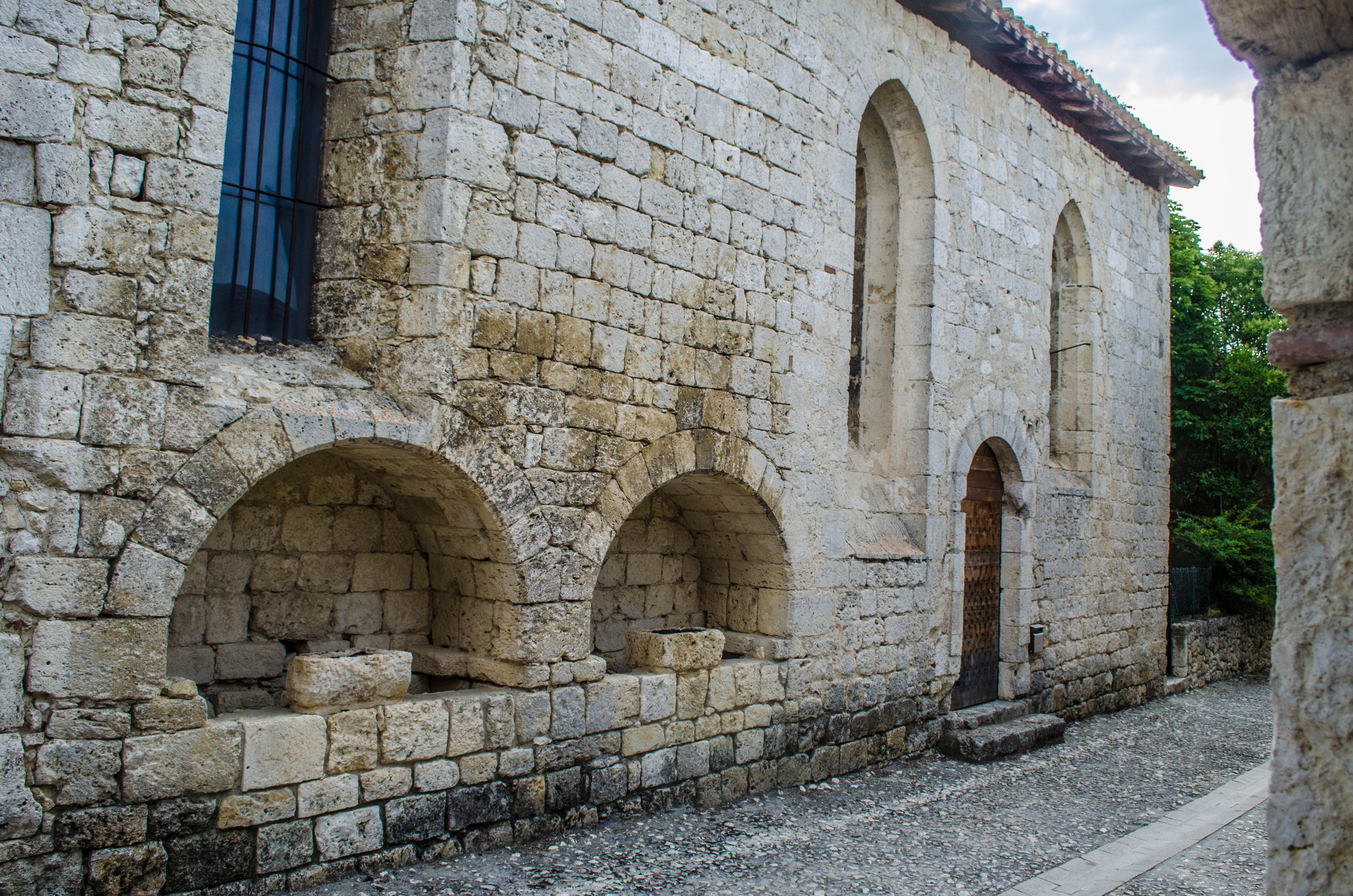 Saint-Clar (Gers, France), vieille église, façade Sud.